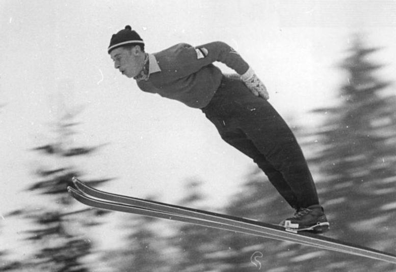 Zentralbild Wlocka-Wendorf 18.2.56 VII. Wintersportmeisterschaften der DDR in Oberhof Beim Trainingsspringen auf der Thüringenschanze. UBz: Bronzemedaillengewinner von Cortina Harry Glass sprang in guter Haltung.